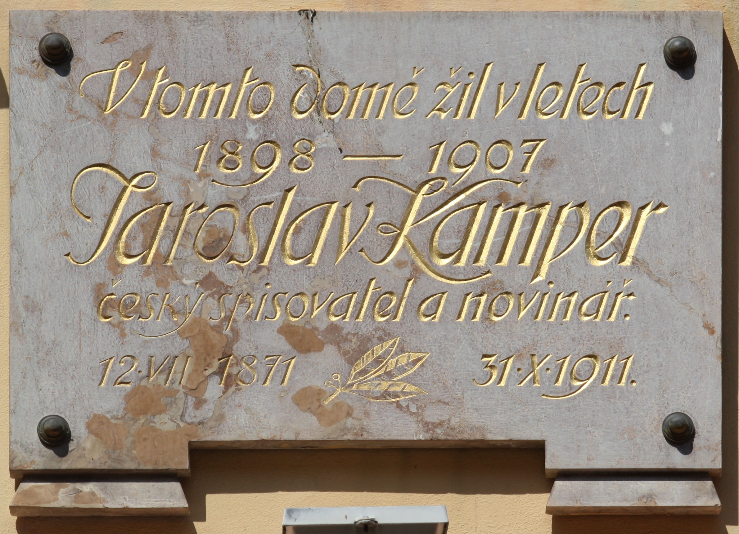 Pamětní deska. Nerudova 40, Malá Strana čp. 223, Praha.Text: "V tomto domě žil v letech 1898–1907 Jaroslav Kamper, český spisovatel a novinář. 12. VII. 1871 – 31. X. 1911.